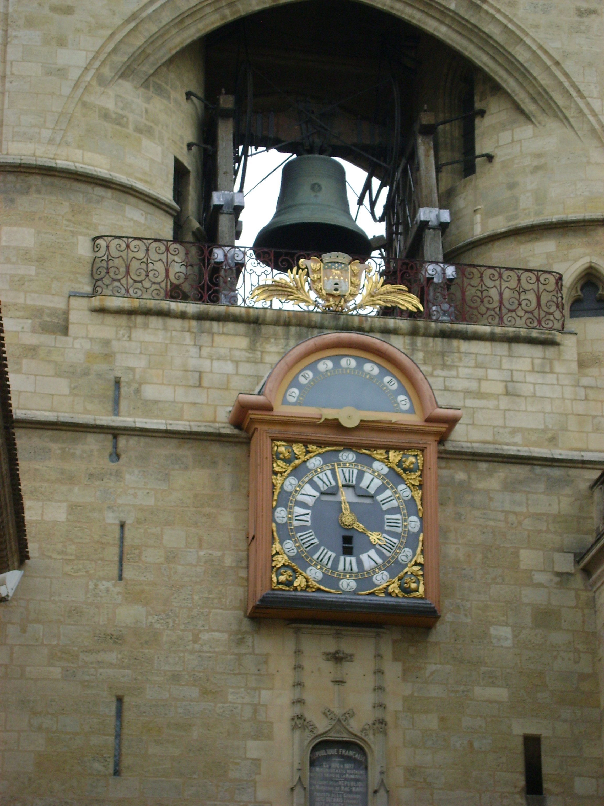 La Grosse Cloche de Bordeaux. Détail de l'Horloge du coté du cours Victor-Hugo .